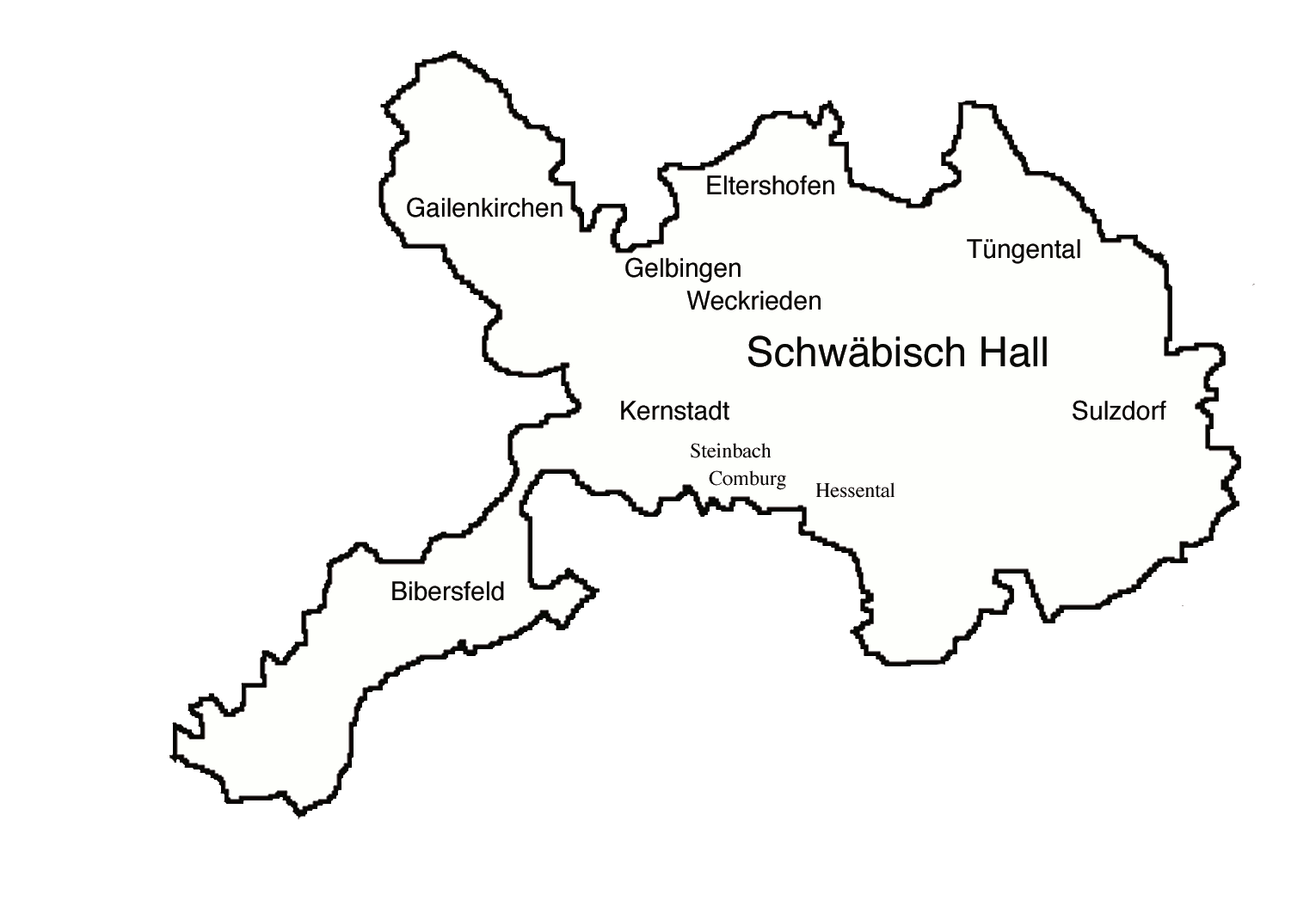 Layout of quarters in Schwäbisch Hall, Baden-Württemberg, Germany